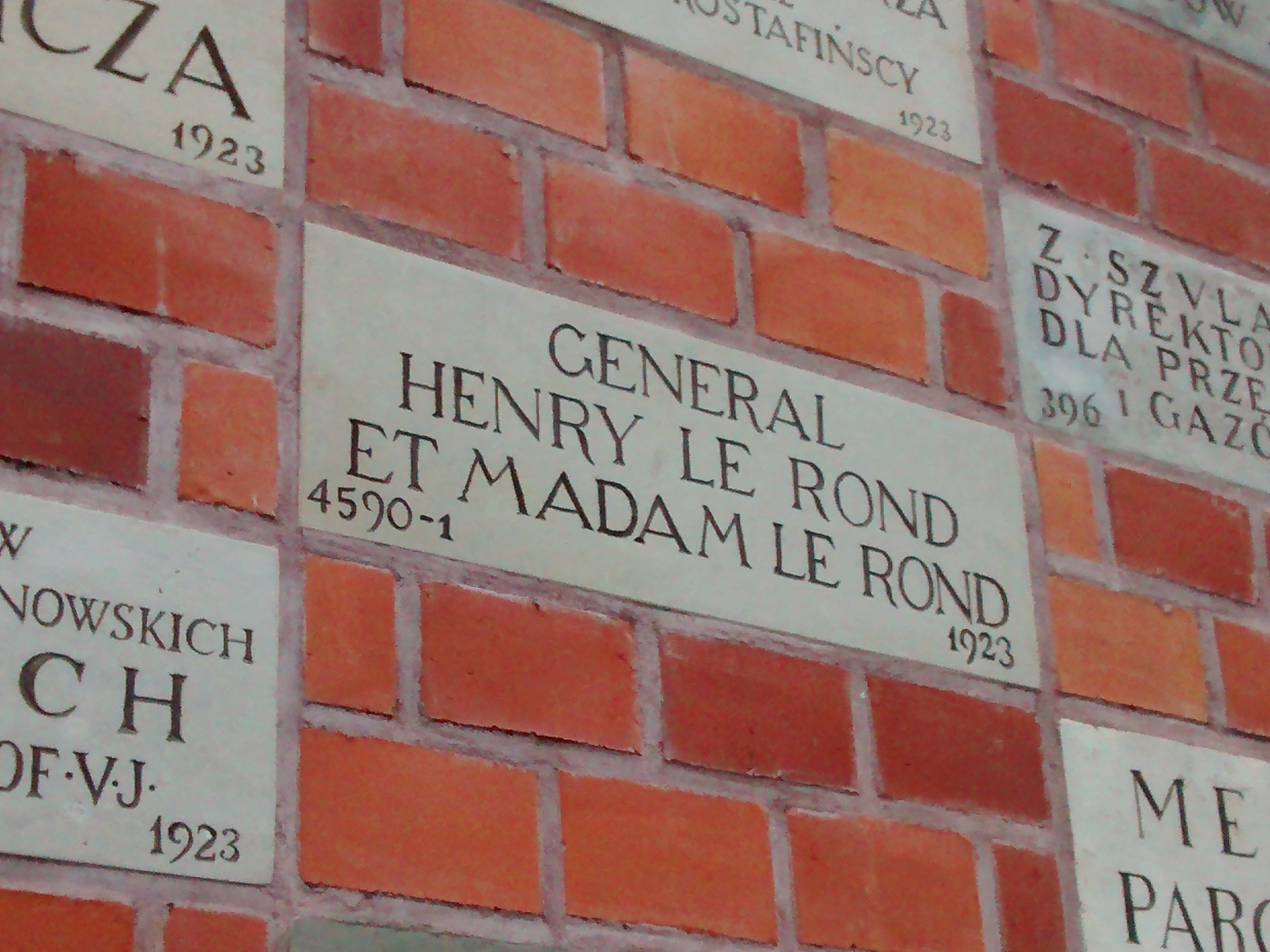 Gen. Henri Le Rond wraz z małżonką w 1923 bym jednym z ofiarodawców na rzecz odnowy wzgórza wawelskiego. Upamiętnia to jedna z cegiełek w murze przy północnym wjeździe na zamek.